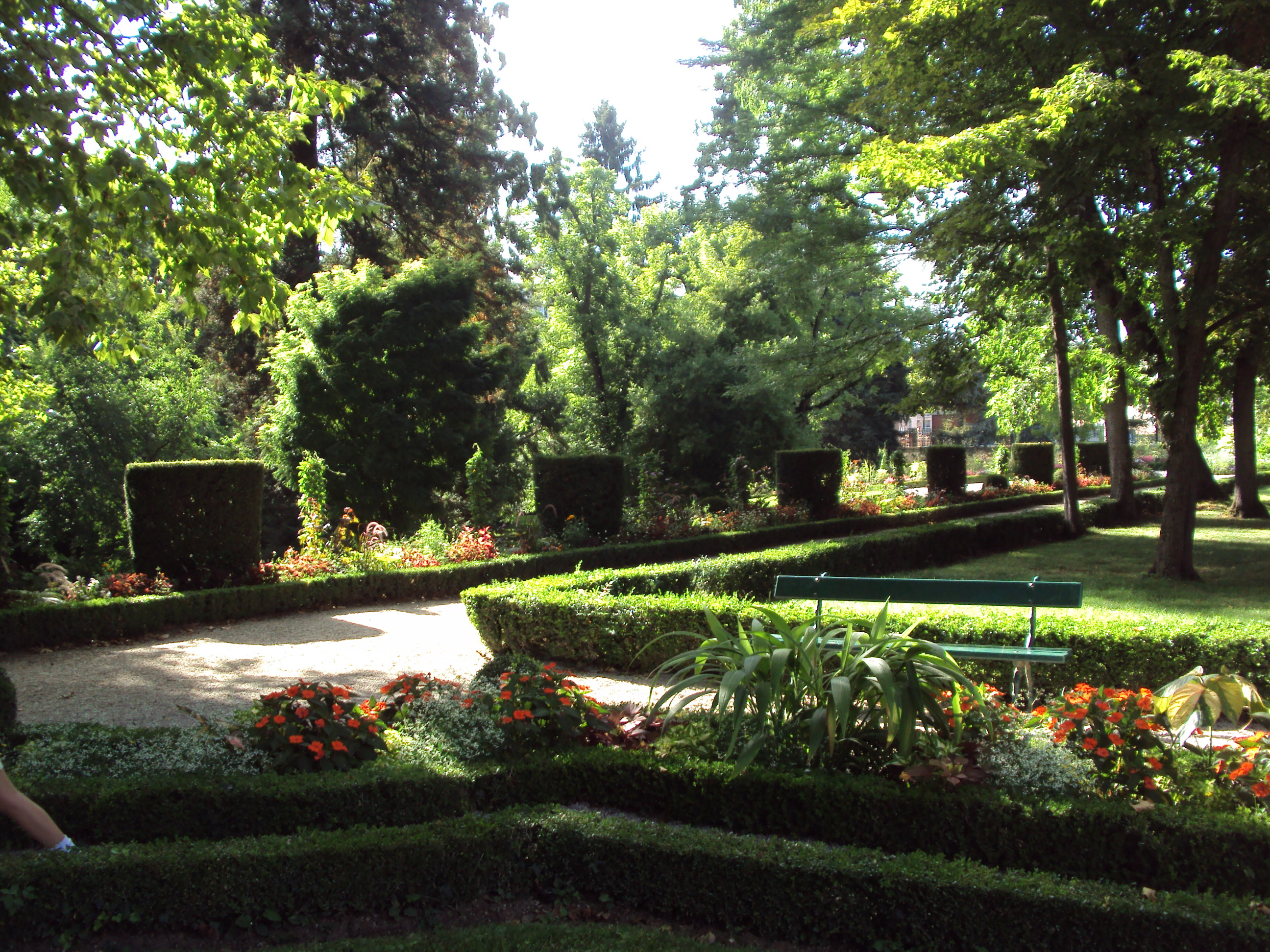 Le Parc Rochegude est classé Jardin remarquable par le Ministère de la Culture, il constitue une aire protégée pour une riche population d'oiseaux. Albi, FRANCE